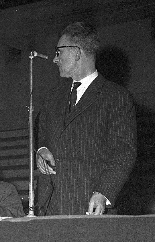 Halle aux Grains, place Dominique-Martin-Dupuy. 20 janvier 1962. Vue de Raymond Badiou, ancien maire de Toulouse, faisant un discours lors d'un meeting du Parti Socialiste Unifié (PSU) contre la guerre en Algérie en présence de Pierre Mendès France.